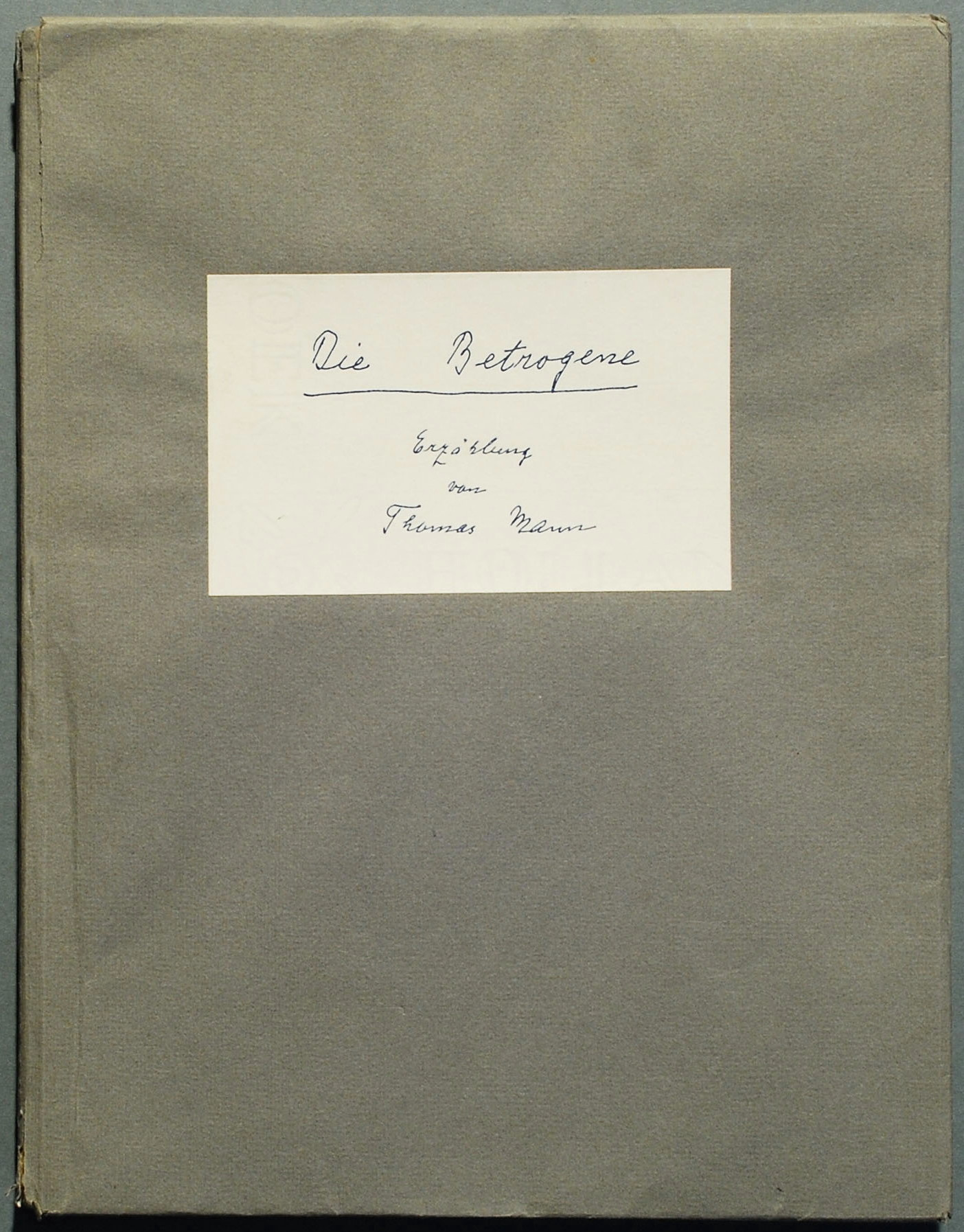 Mann, Thomas: Die Betrogene. Erzählung. [1953] Faksimile des Manuskriptes in Kupfertiefdruck auf echt holländischem Bütten „Pannekoeck“, hergestellt von Frédérik Wahli, Lausanne. Mit einer Orig.-Porträtlithographie Thomas Manns von Ernst Morgenthaler, vom Künstler mit Bleistift monogrammiert, (Potempa E 33.3). Original-Karton 4° (30 x 23 cm) mit Original-Umschlag. Bibliophiler Druck, Exemplar 264 / 400